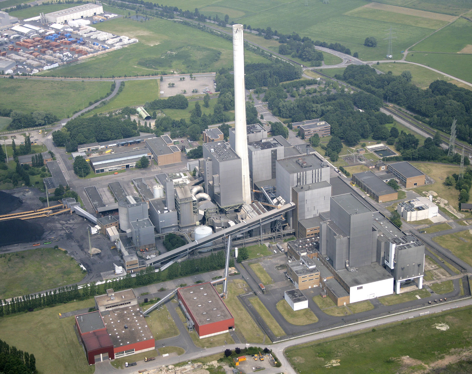 Luftbildaufnahme Hamm